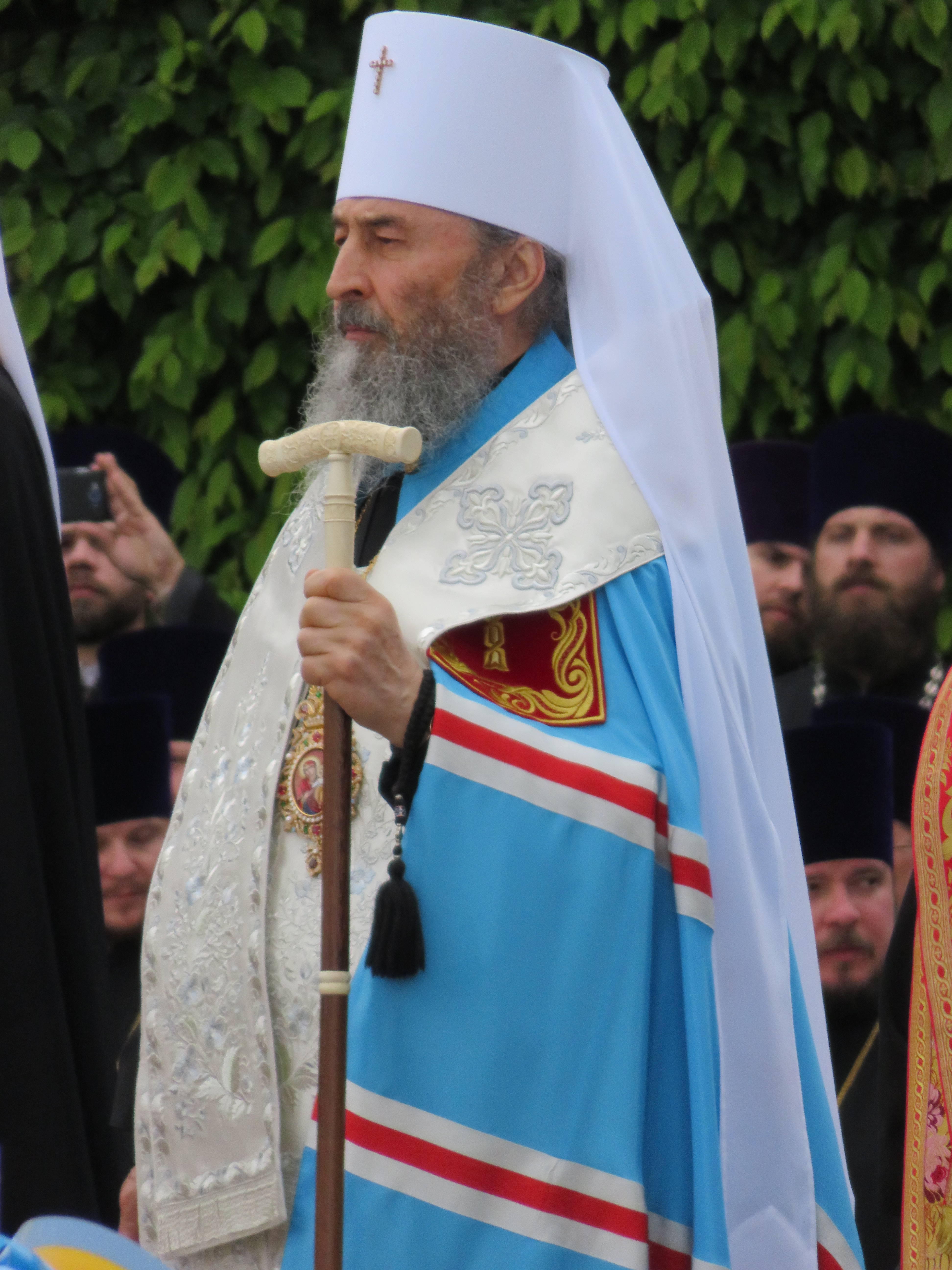 Митрополит Онуфрій (Березовський) під час молебню 8 травня 2016 у Парку Слави